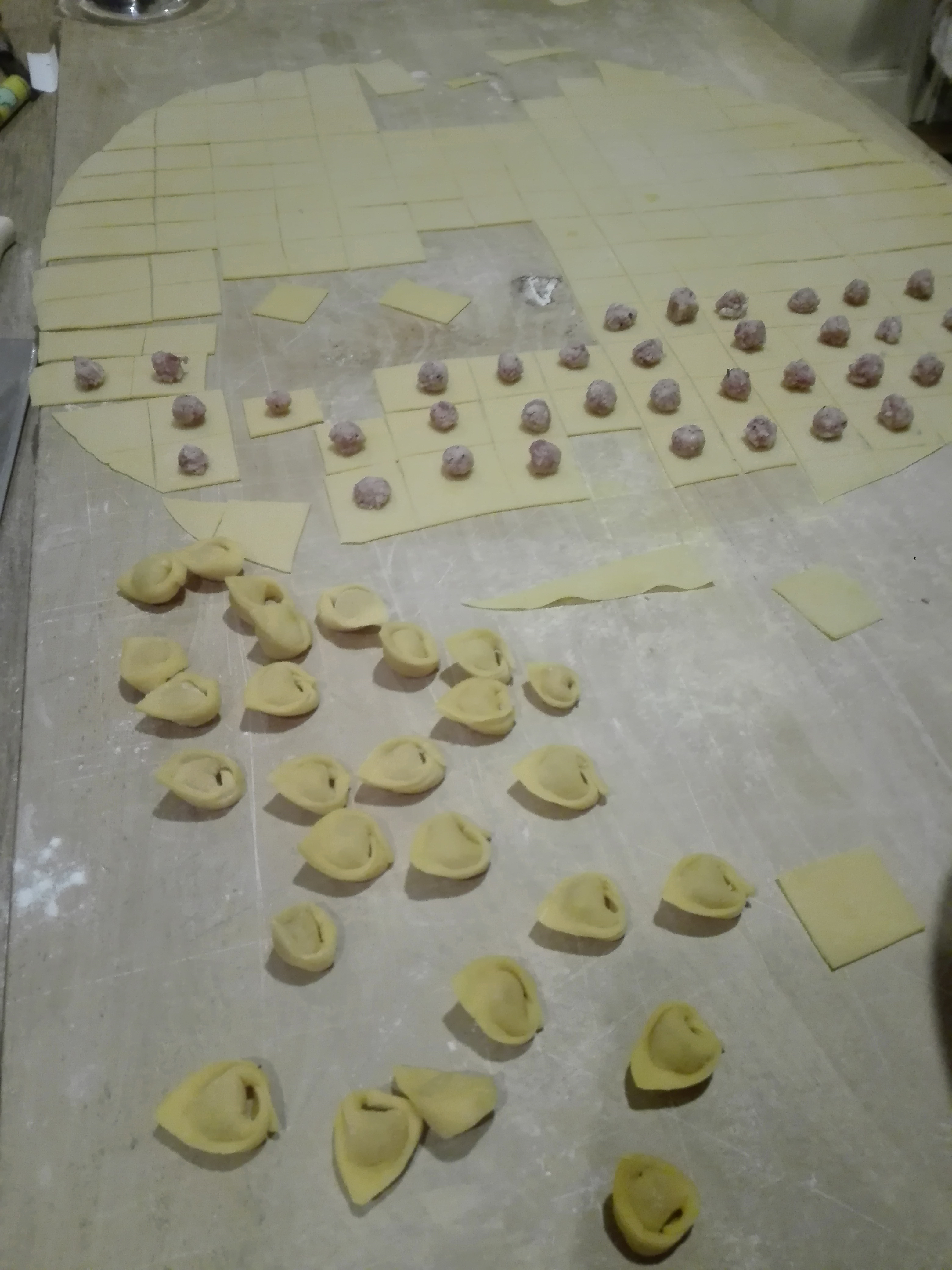 Tagliere con preparazione tortellini bolognesi